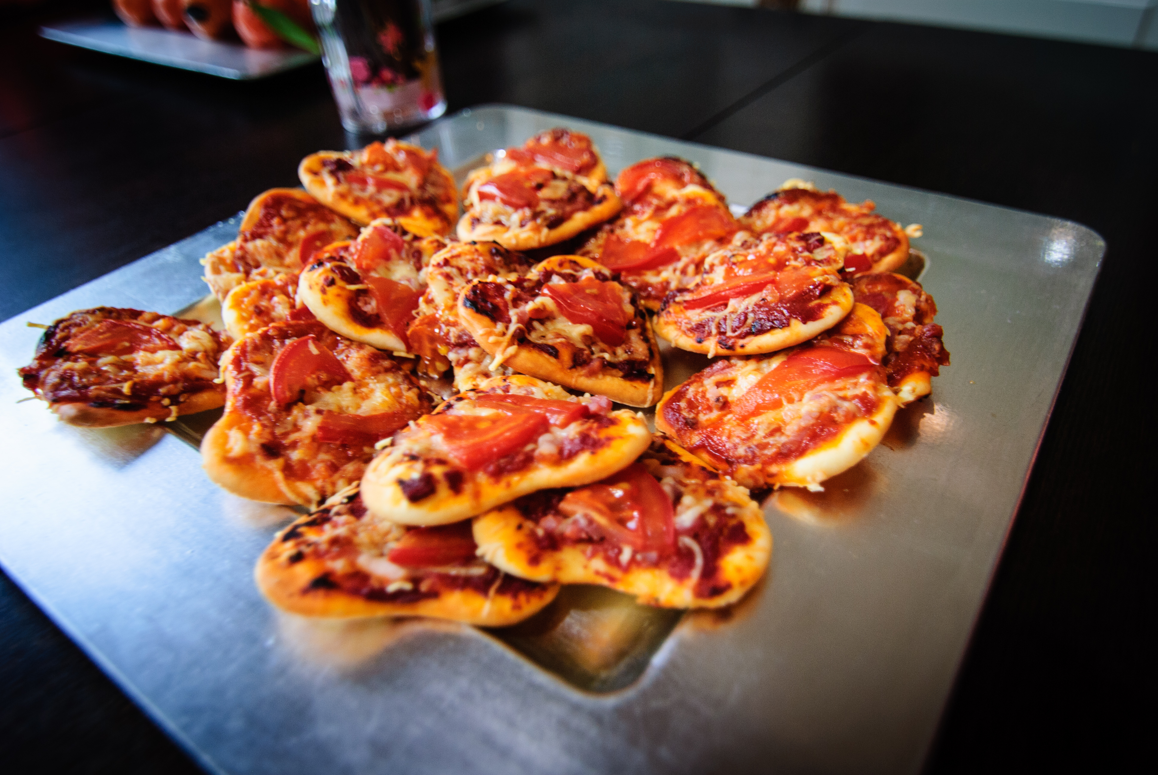 Heart shape pizzetta